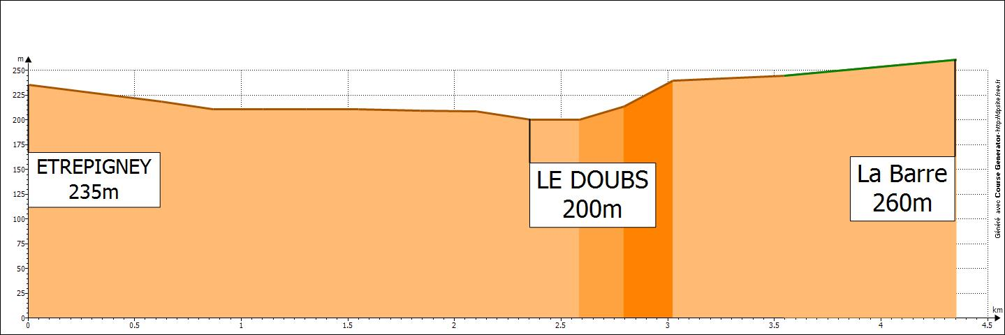 ETREP COUPE